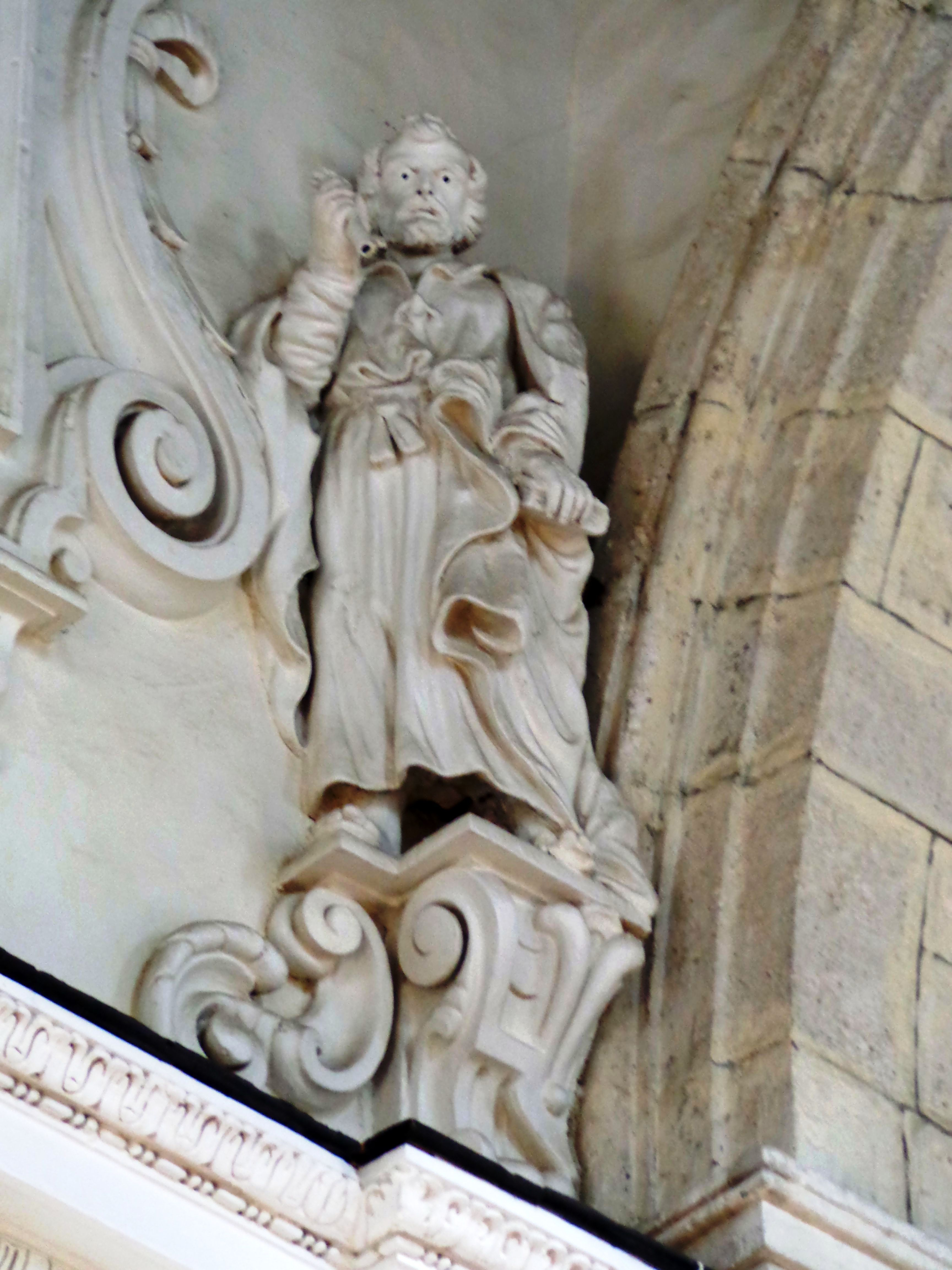 Duomo Condrò stucchi navate